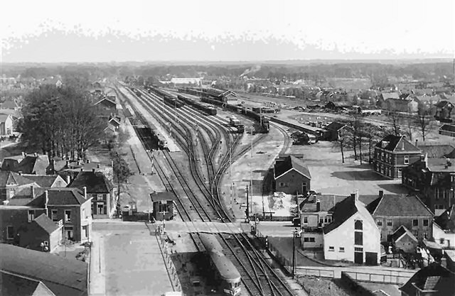 Station_winterswijk_1950.